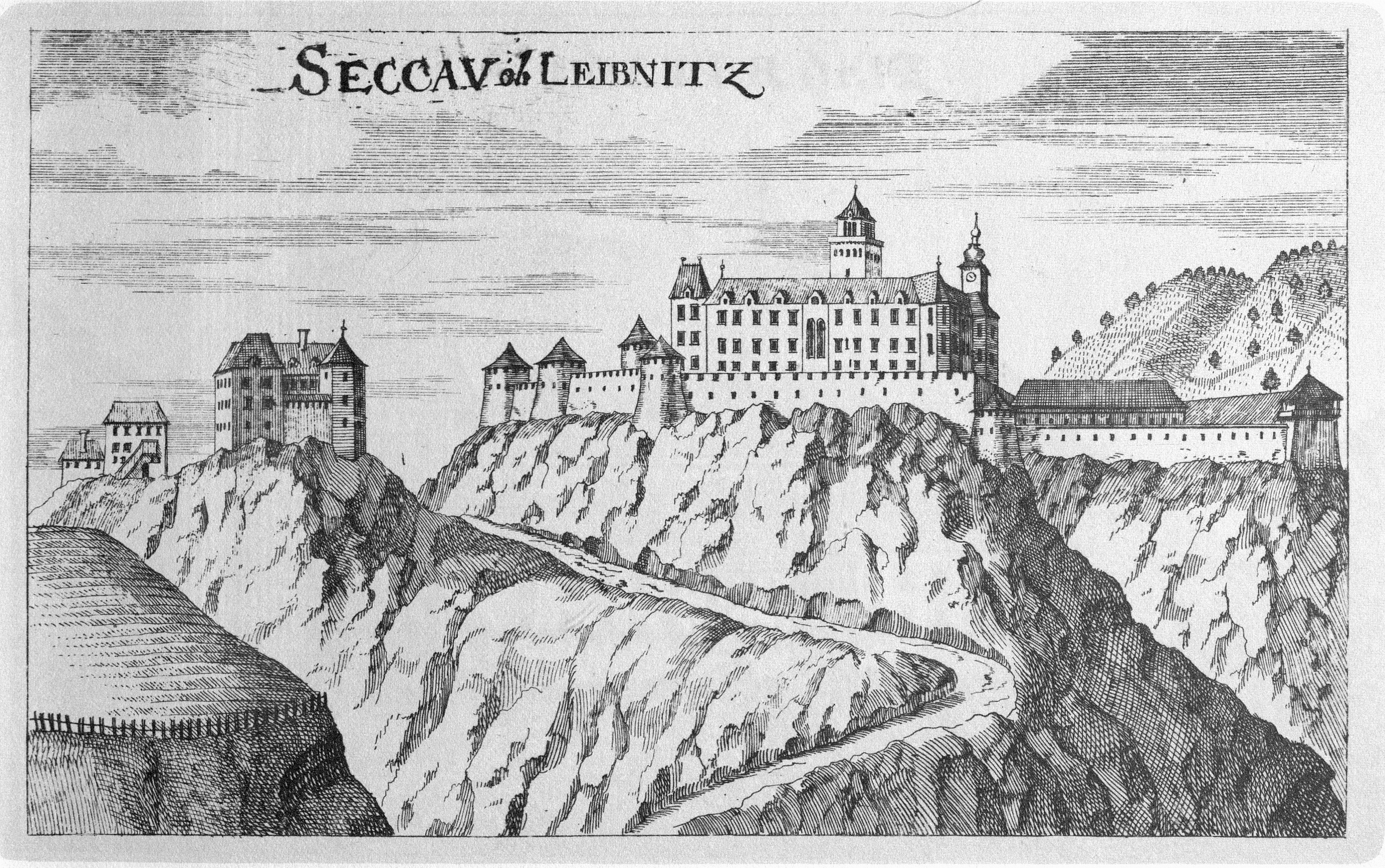 G. M. Vischers Käyserlichen Geographi, Topographia Ducatus Stiriae, Das ist: Eigentliche Delineation / und Abbildung aller Städte / Schlösser / Marcktfleck / Lustgärten / Probsteyen / Stiffter / Clöster und Kirchen / so es sich im Herzogthumb Steyrmarck befinden; Und anjetzo Umb einen billichen Preyß zu finden seynd Bey Johann Bitsch Universitäts Buchhandlern / Auff dem Juden=Platz bey der guldenen Saulen. Graz 1681 Die Nummerierung der Dateien folgt der alphabetischen Reihung der Ortsnamen und entspricht nicht dem Vischer-Register